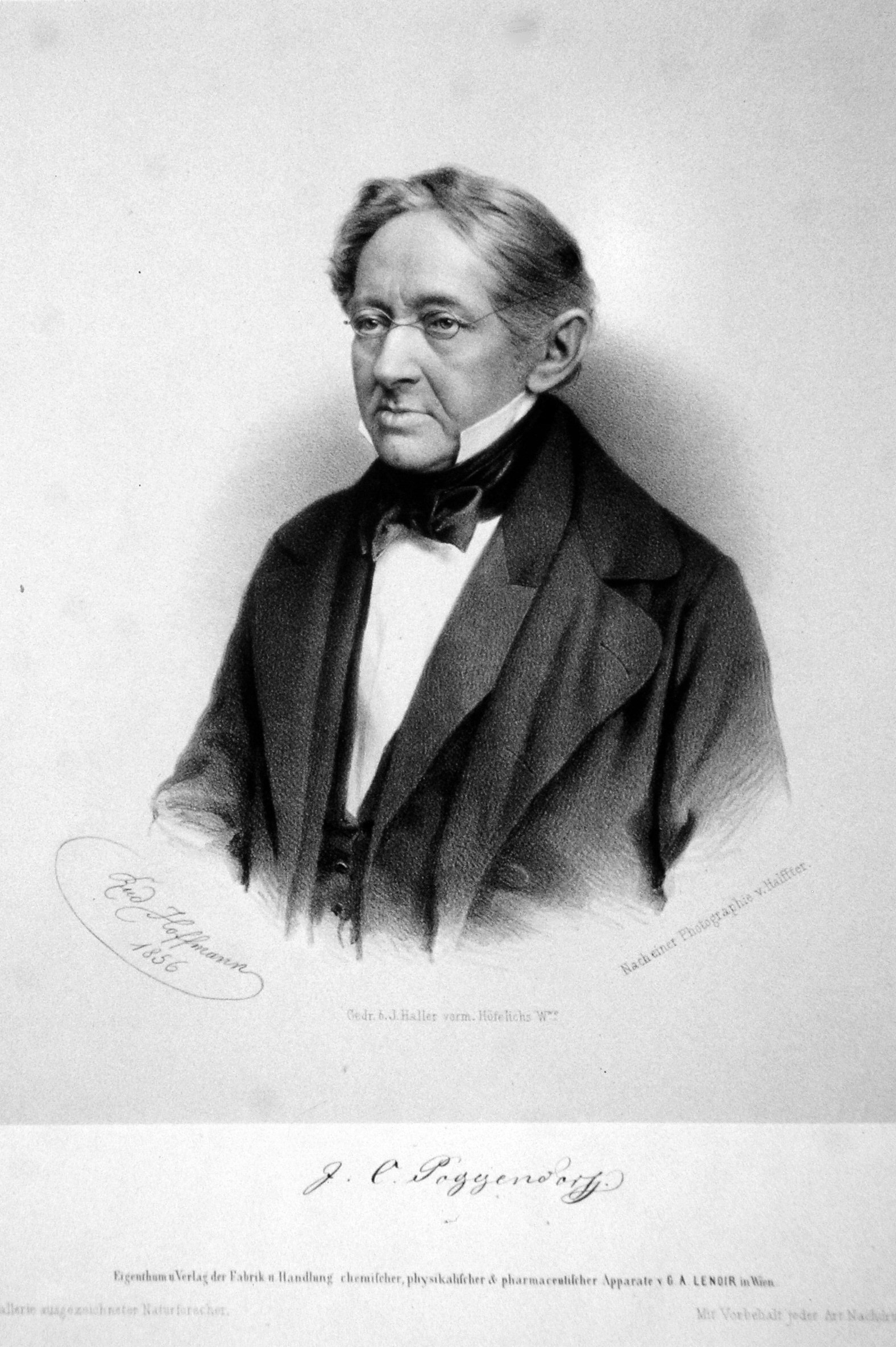 Johann Christian Poggendorff (deutscher Physiker); Lithographie von Rudolf Hoffmann, 1856. Nach einer Fotografie von Halffter